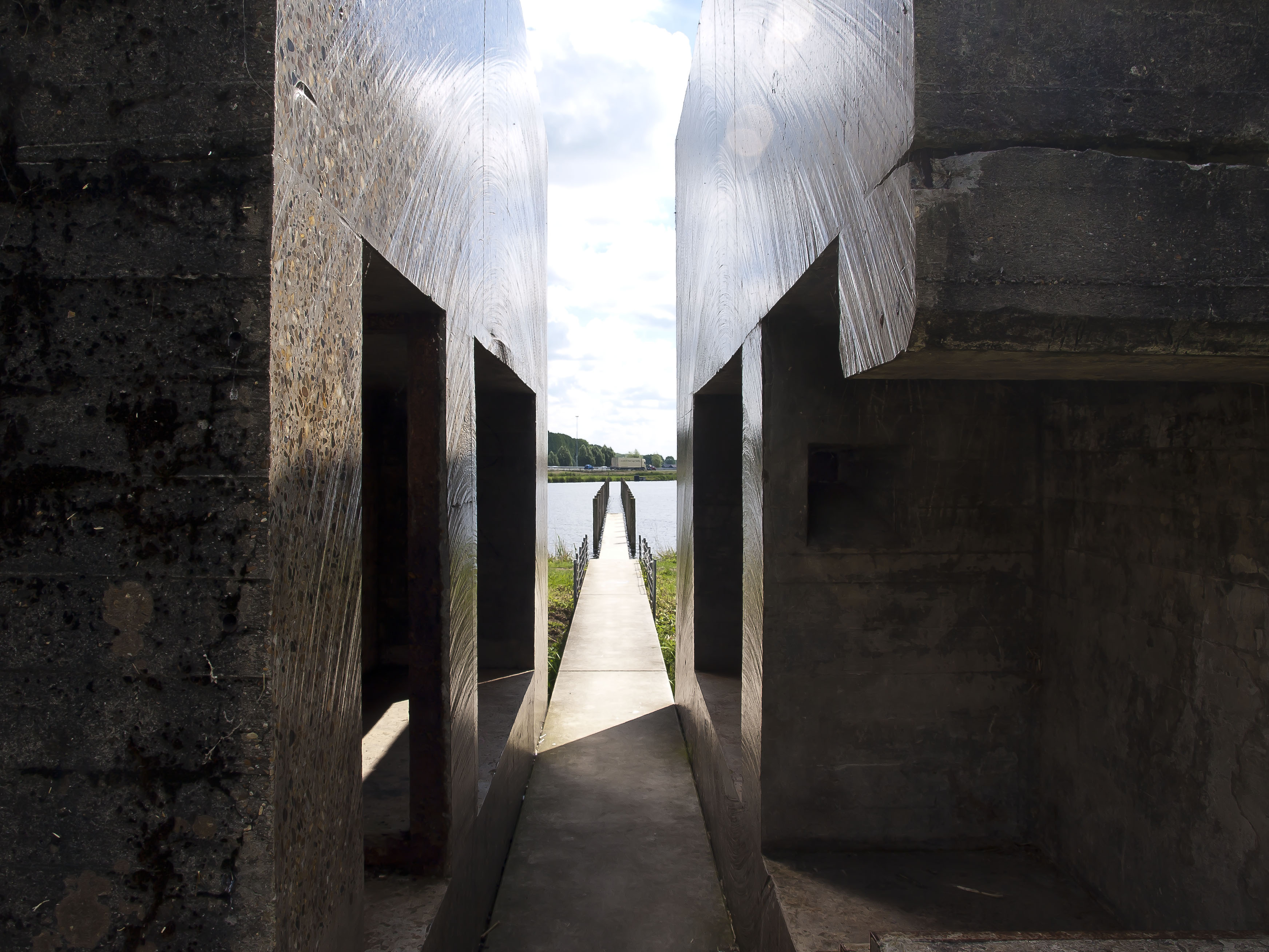 hemelvaart 2014